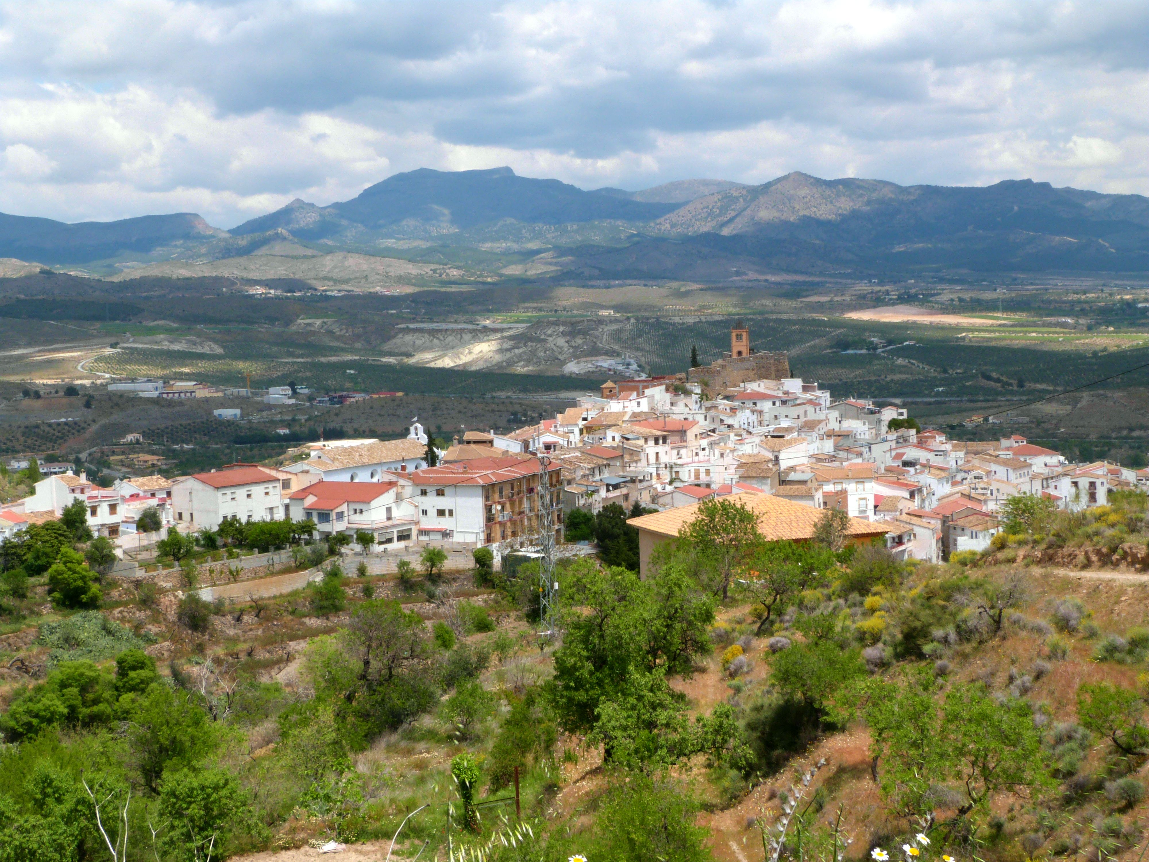 Serón